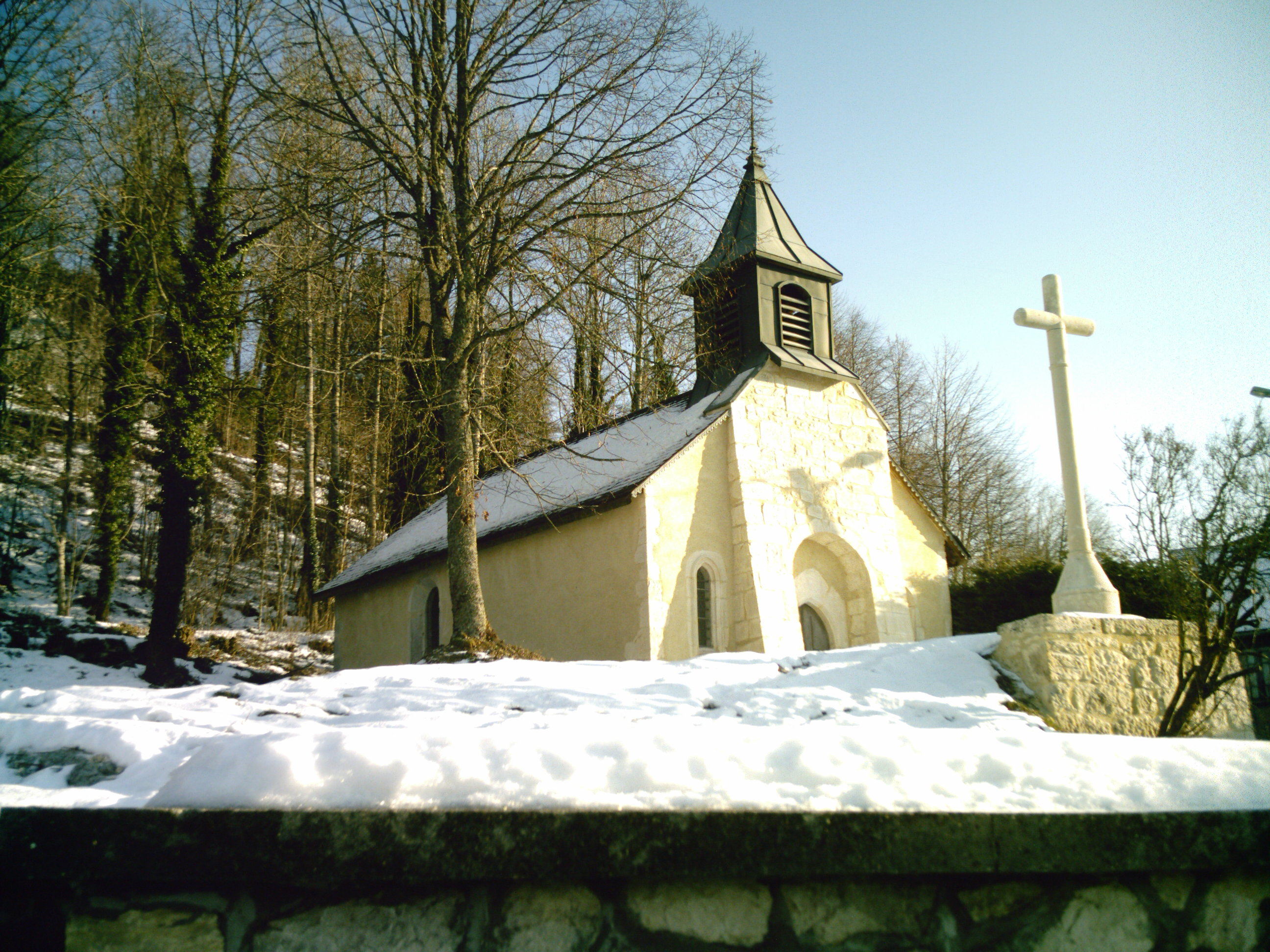 La chapelle Saint-Pierre de Lompnes (Hauteville-Lompnès, FRANCE)